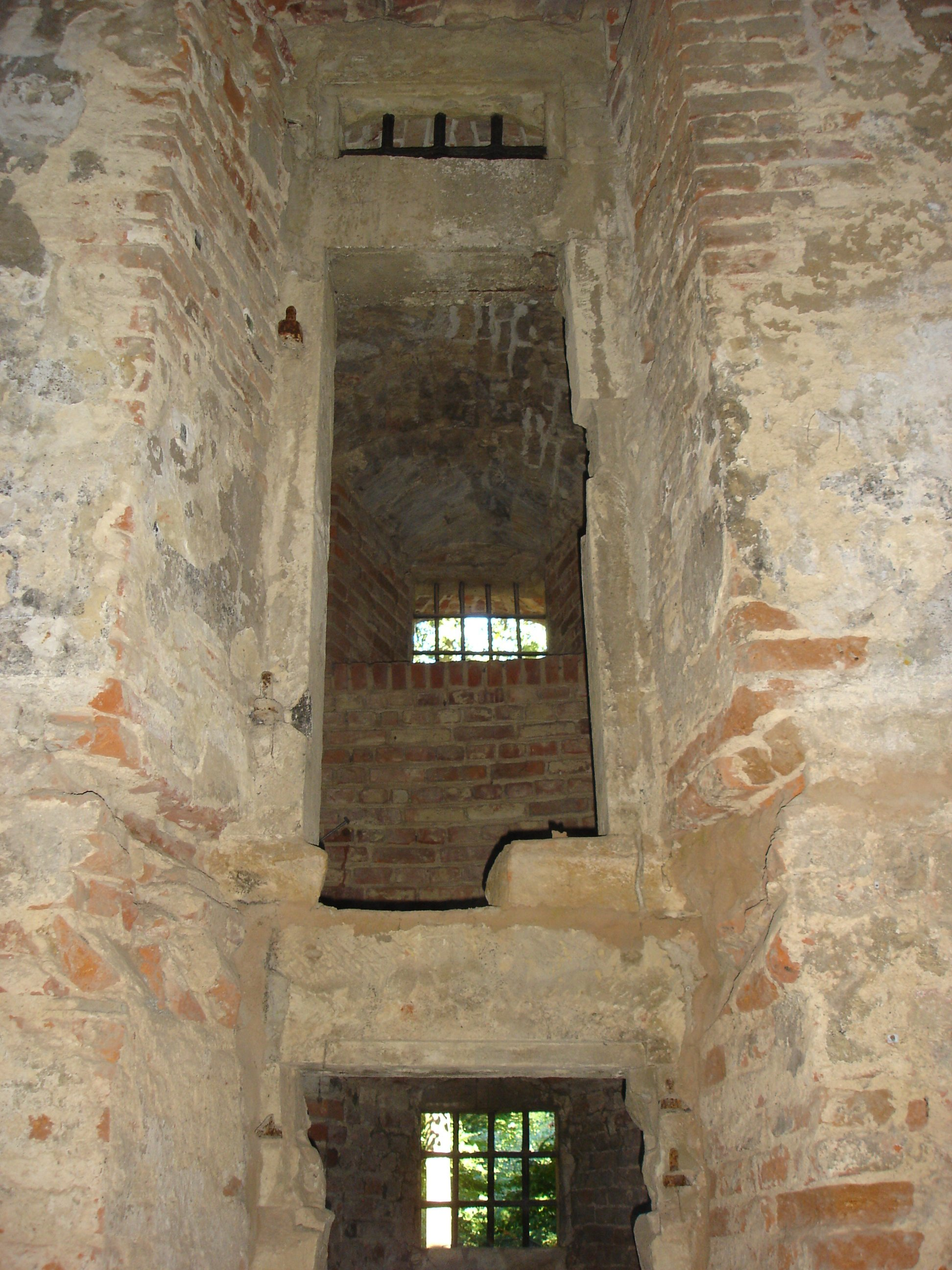 Tag des offenen Denkmals 2006: Blick vom Kellergeschoss nach oben durch eine Zelle im Erdgeschoss im Zwinger in Münster, Deutschland